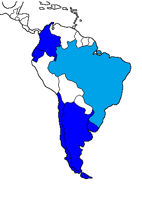 Clasificados de la Conmebol para la Copa Mundial de Fútbol de 2014. (Brasil era el anfitrión)